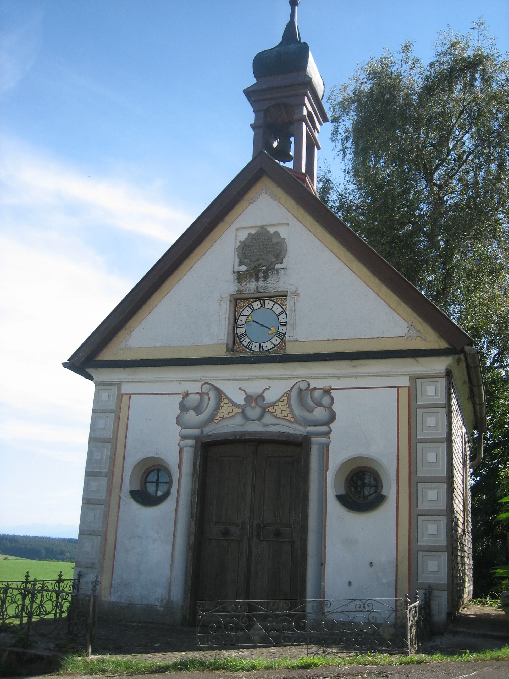 St. Anna, Kornhofen, Bad Grönenbach, Landkreis Unterallgäu, Bayern